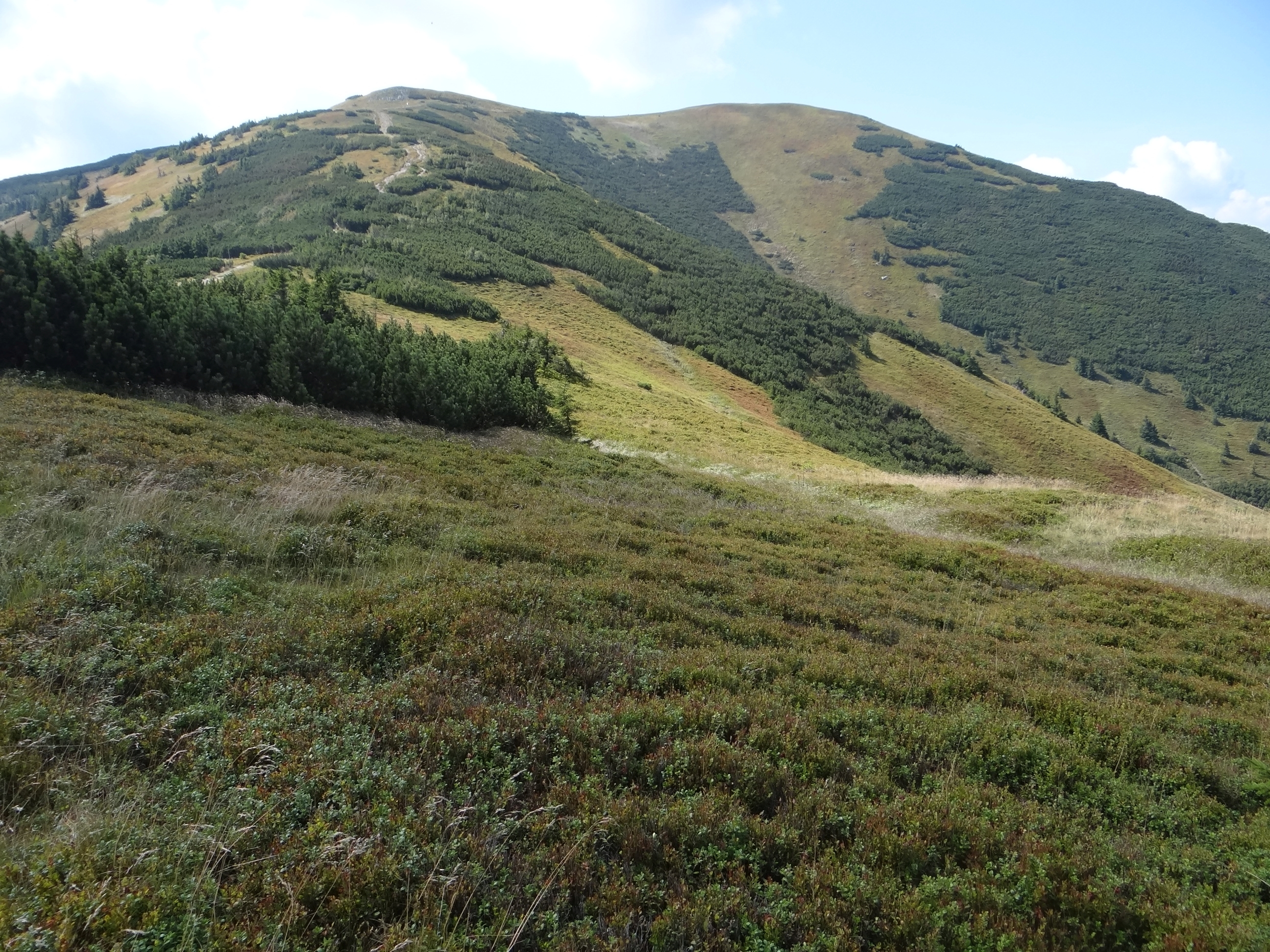 Grzbiet od przełęczy Košarisko do Prašivá w Niżnych Tatrach